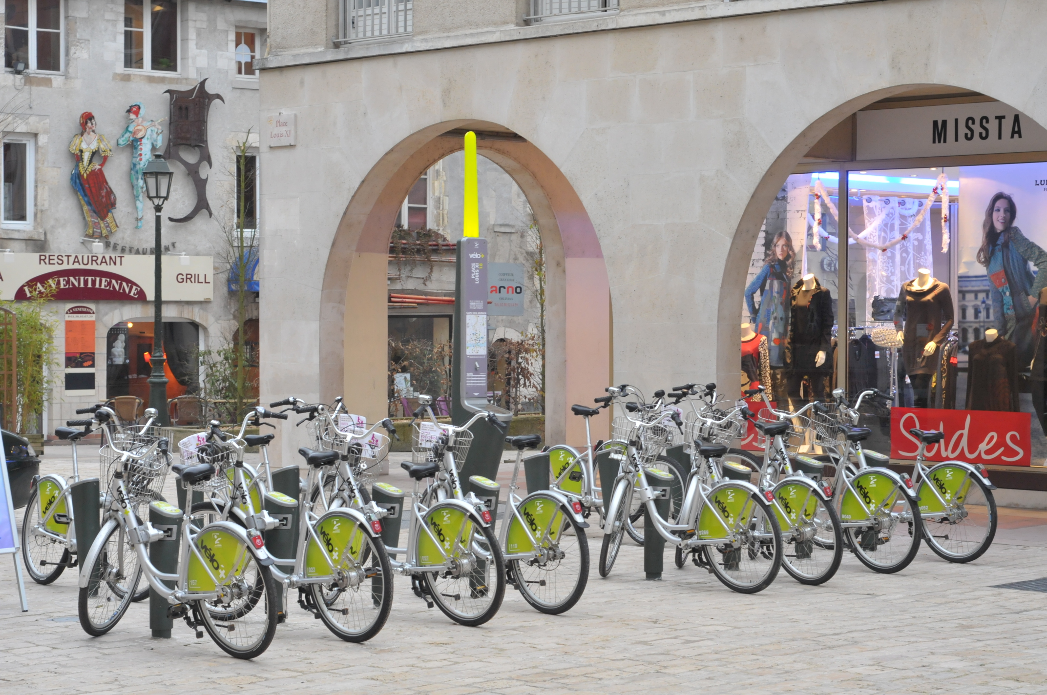 Station Vélo'+, place Louis XI, Orléans, Loiret, France